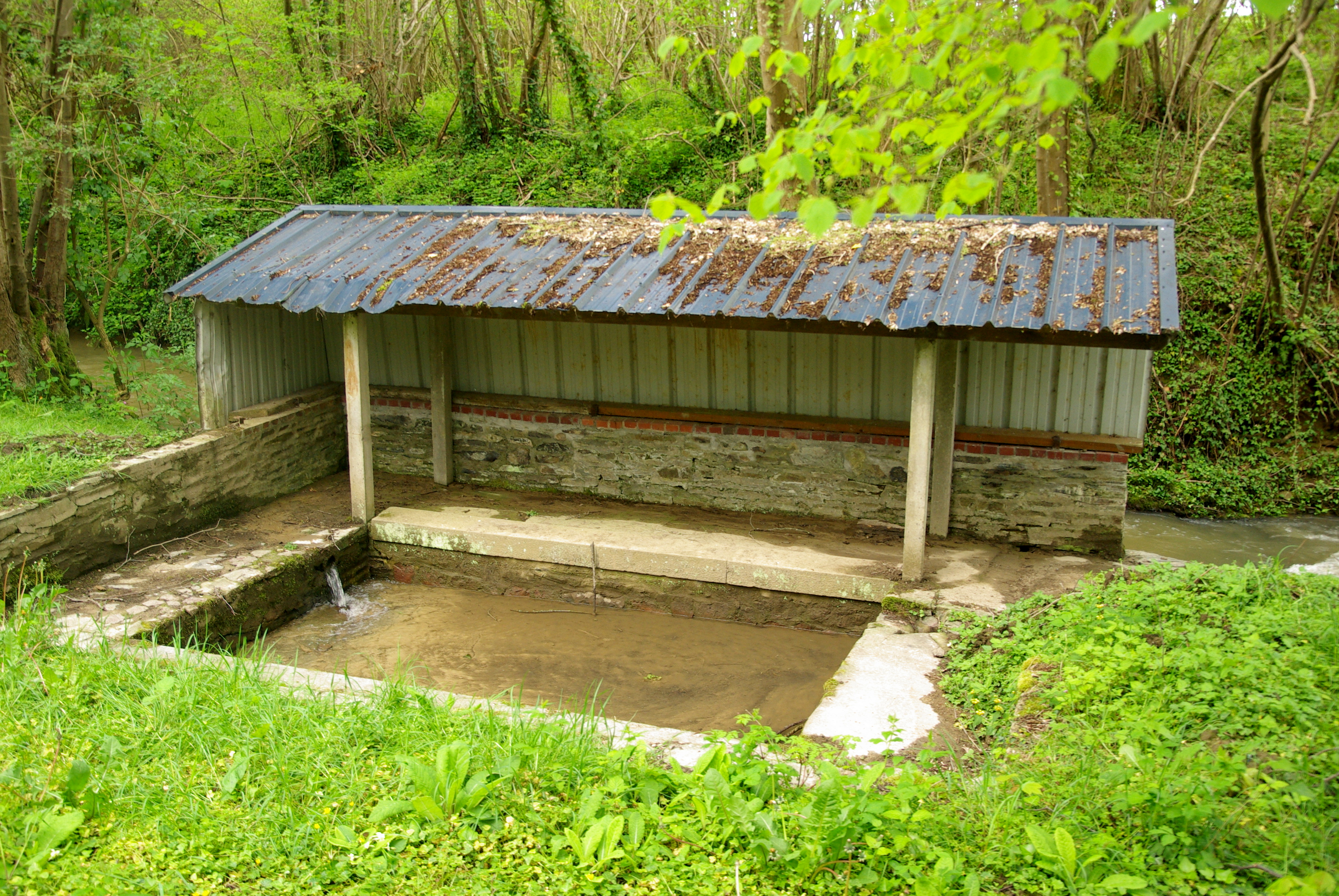 Lavoir situé à Montigny (14), sur le ruisseau Nidalos.